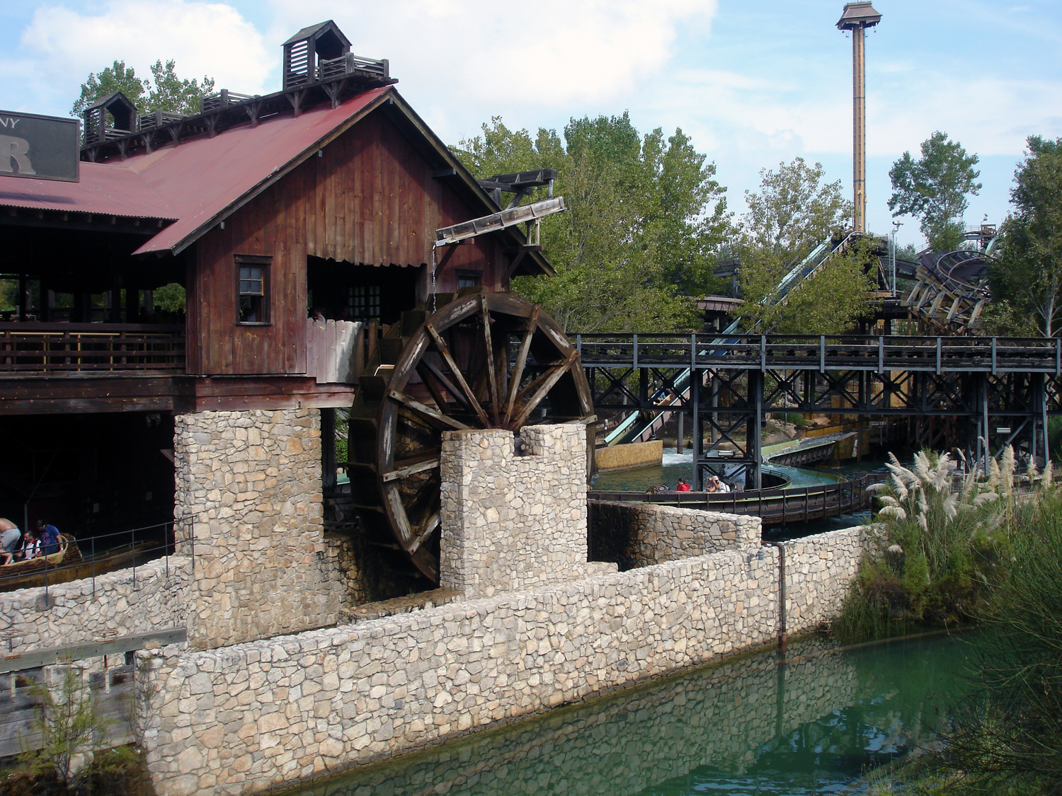 Port Aventura - Parte exterior de Silver River, en la zona Far West